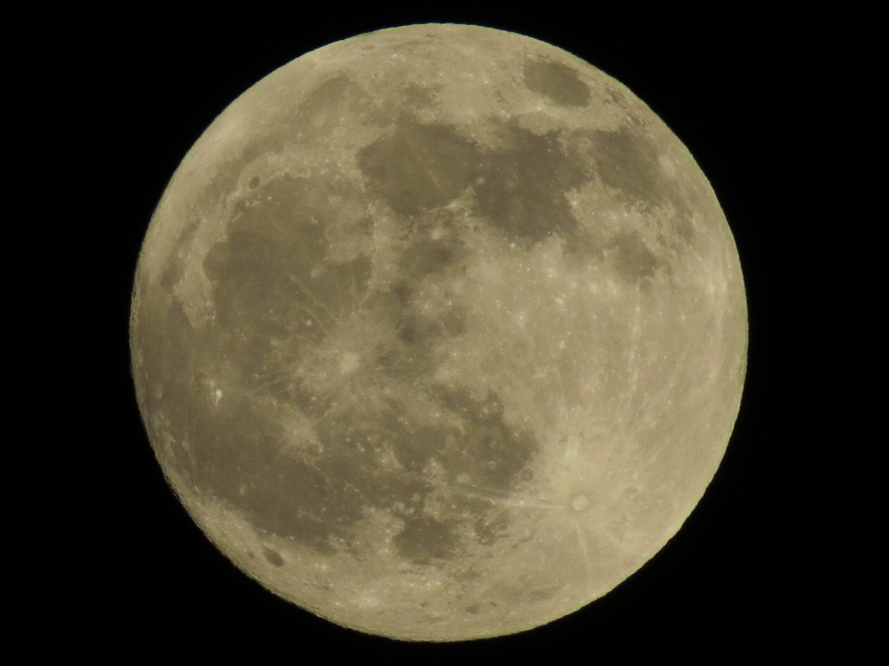 14-04-2014 Vollmond fullmoon